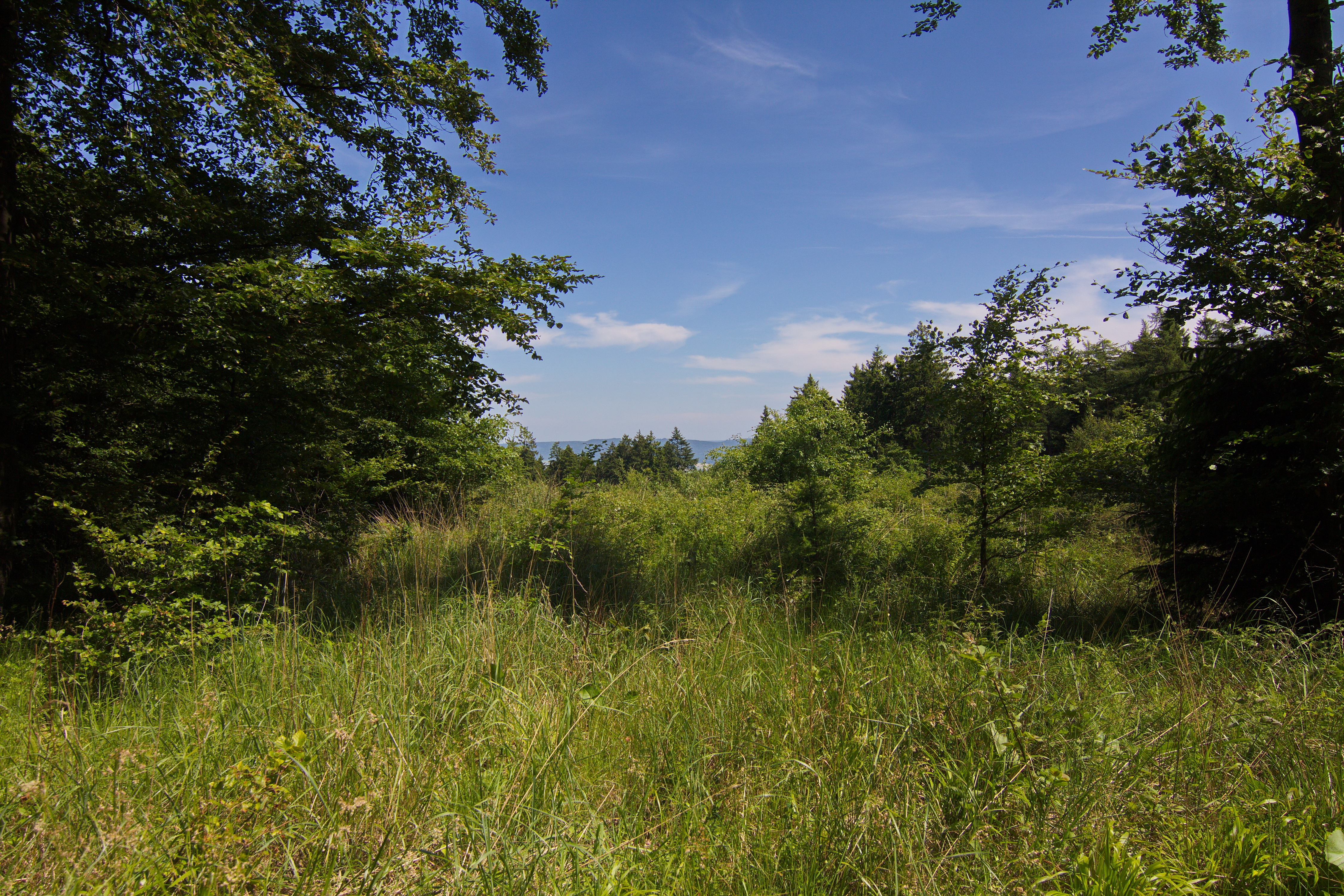 Landschaftsschutzgebiet Süntel, Niedersachsen, Deutschland